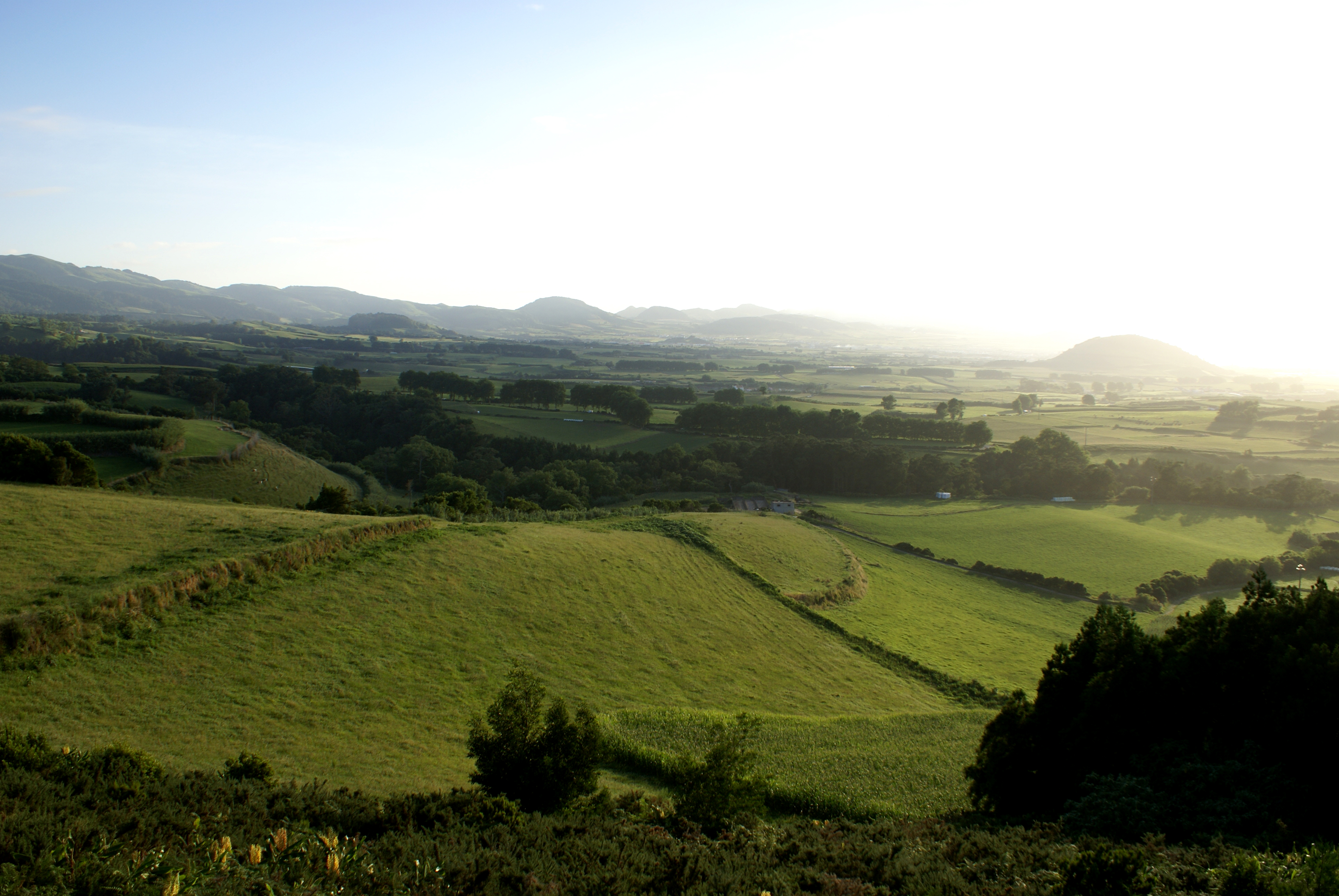 Miradouro de Santa Iria, Porto Formoso, ilha de São Miguel, Açores